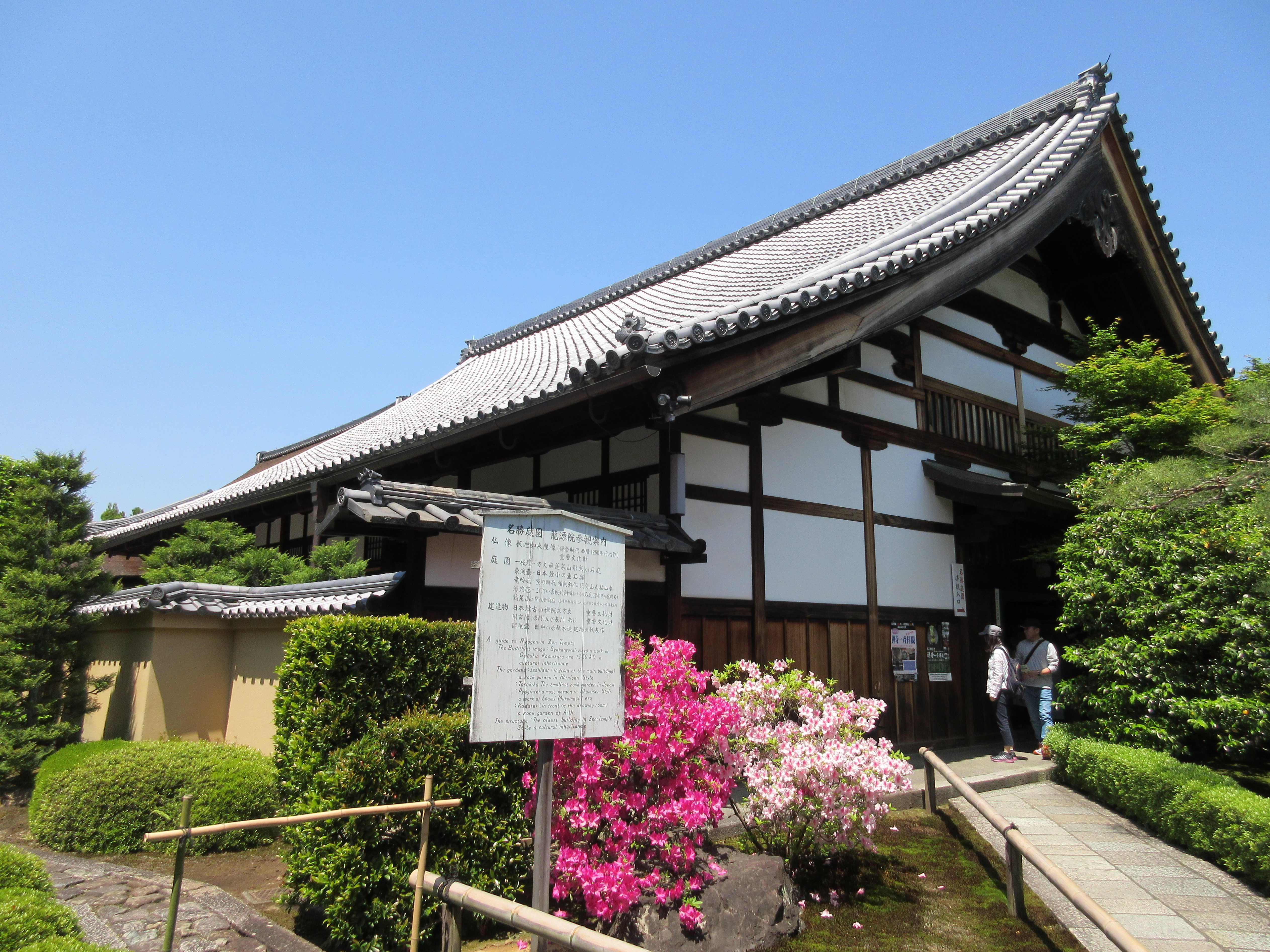 龍源院方丈